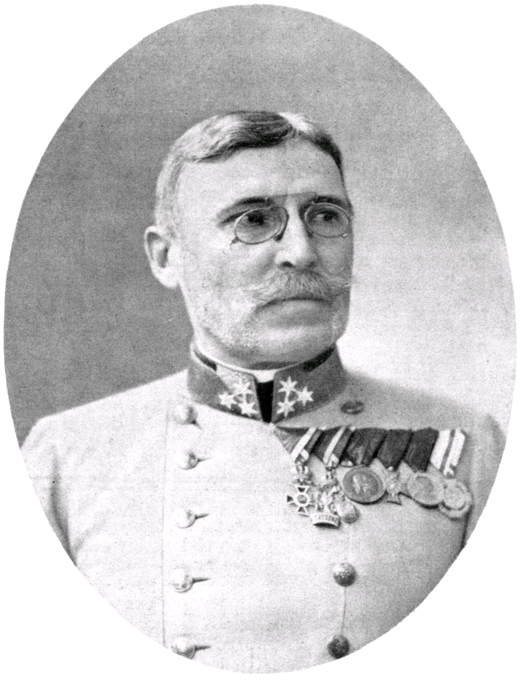 Moritz von Auffenberg (1915: Moritz Freiherr Auffenberg von Komarów; 1852-1928), Austrian-Hungarian general and politician